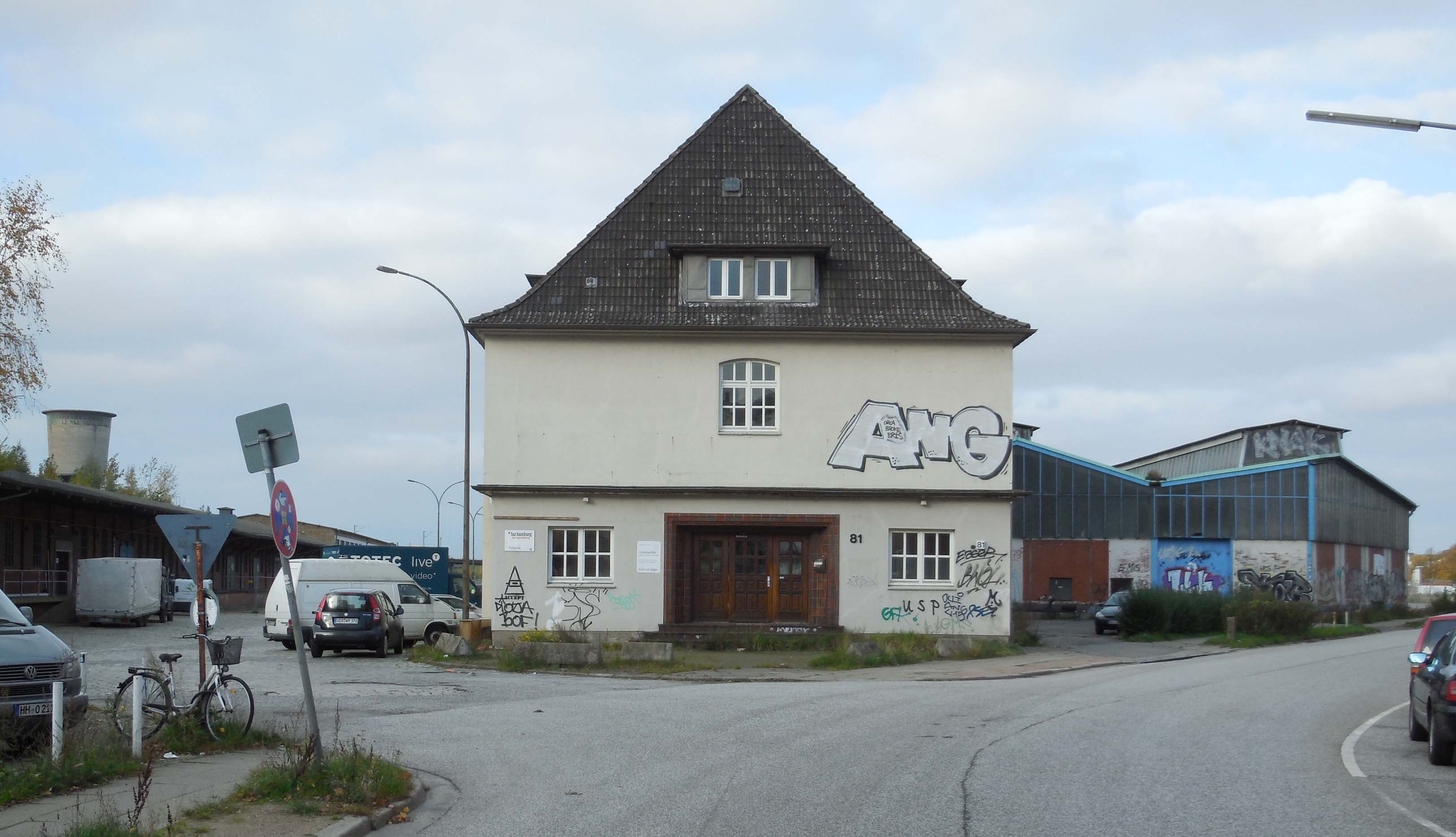 Stirnseiten von Güterabfertigungsgebäude und Ladebühnenhallen an der Zufahrt zum ehemaligen Güterbahnhof Hamburg Altona, Zustand Oktober 2015